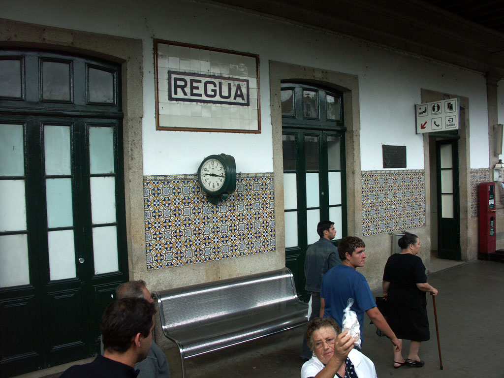 paragem na Régua. Tipo: EP (Estação) Local: Régua Linha do Douro, PK 103 Data e hora: 19 de Agosto de 2006 09h16